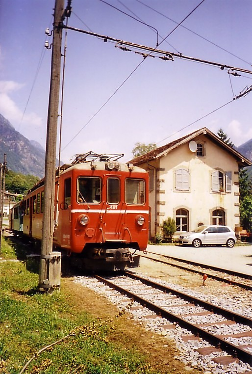 Triebwagen BDe 4/4 491, der Ferrovia Mesolcinese (ehemalige Bellinzona-Mesocco-Bahn, Meterspur Adhäsionsbahn), in der Station Cama, im Juli 2006.